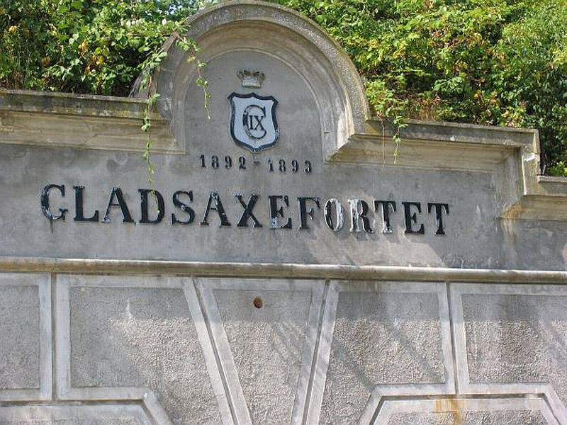 Gladsaxefortet, monogram